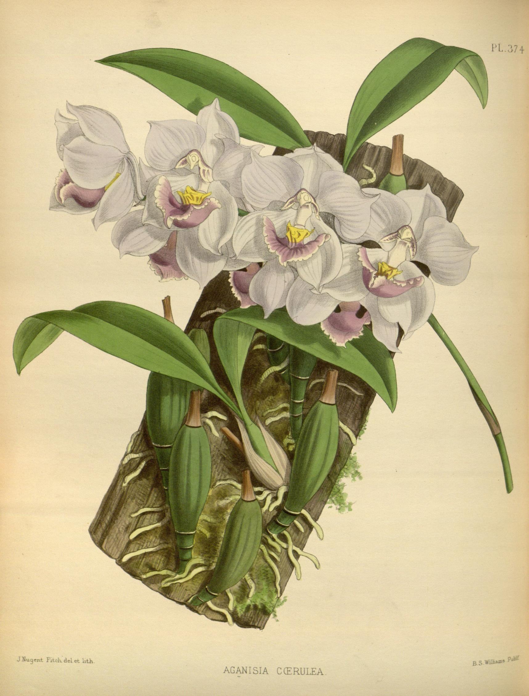 PL.:i74 J Nugent iicck dci et iith. AGANISIA CCERULEA BS.WiiJi*»» I